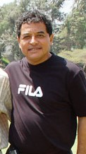 Glorias del Fútbol Peruano. En la Foto de izquiera a derecha Julio César Uribe, Percy Rojas, Dr. Jorge Alva Flroes y (JJ) Juan José Oré.